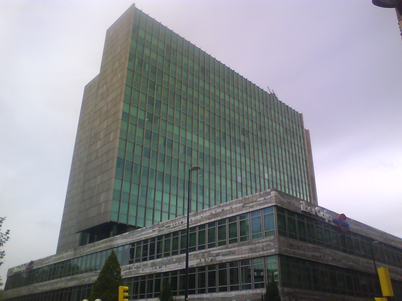 Central en zaragoza